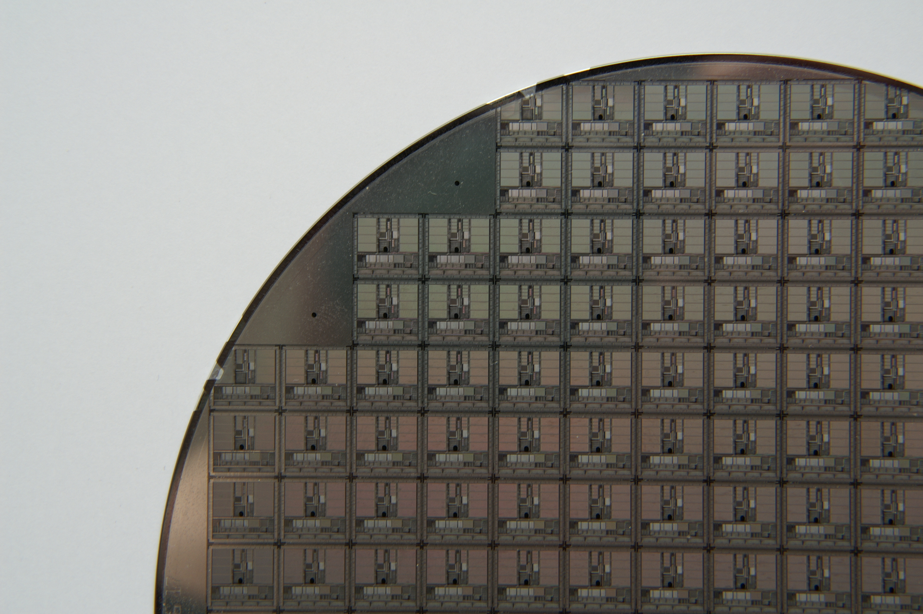 Microprocesseurs sur une tranche de silicium. Il s'agit de microprocesseurs RISC de type SPARC tels que créés par la société T.sqware (startup française rachetée en 1999 par Globespan Virata). Contents 1 Source 2 Statut 3 Licensing 4 Original upload log Source La photo a été prise par Ploum's à partir d'une tranche de silicium en sa possession et qui porte quelques dizaines de processeurs non fonctionnels (on voit sur la photo la petite marque d'encre noire qui a été déposée par le testeur automatique pour identifier les microprocesseurs défaillants — tous — et qui apparaît aussi à certains emplacements sans aucun microprocesseur). Statut Photographie mise volontairement dans le domaine public par son auteur. Ploum's 13 fev 2005 à 17:27 (CET) catégorie:électronique